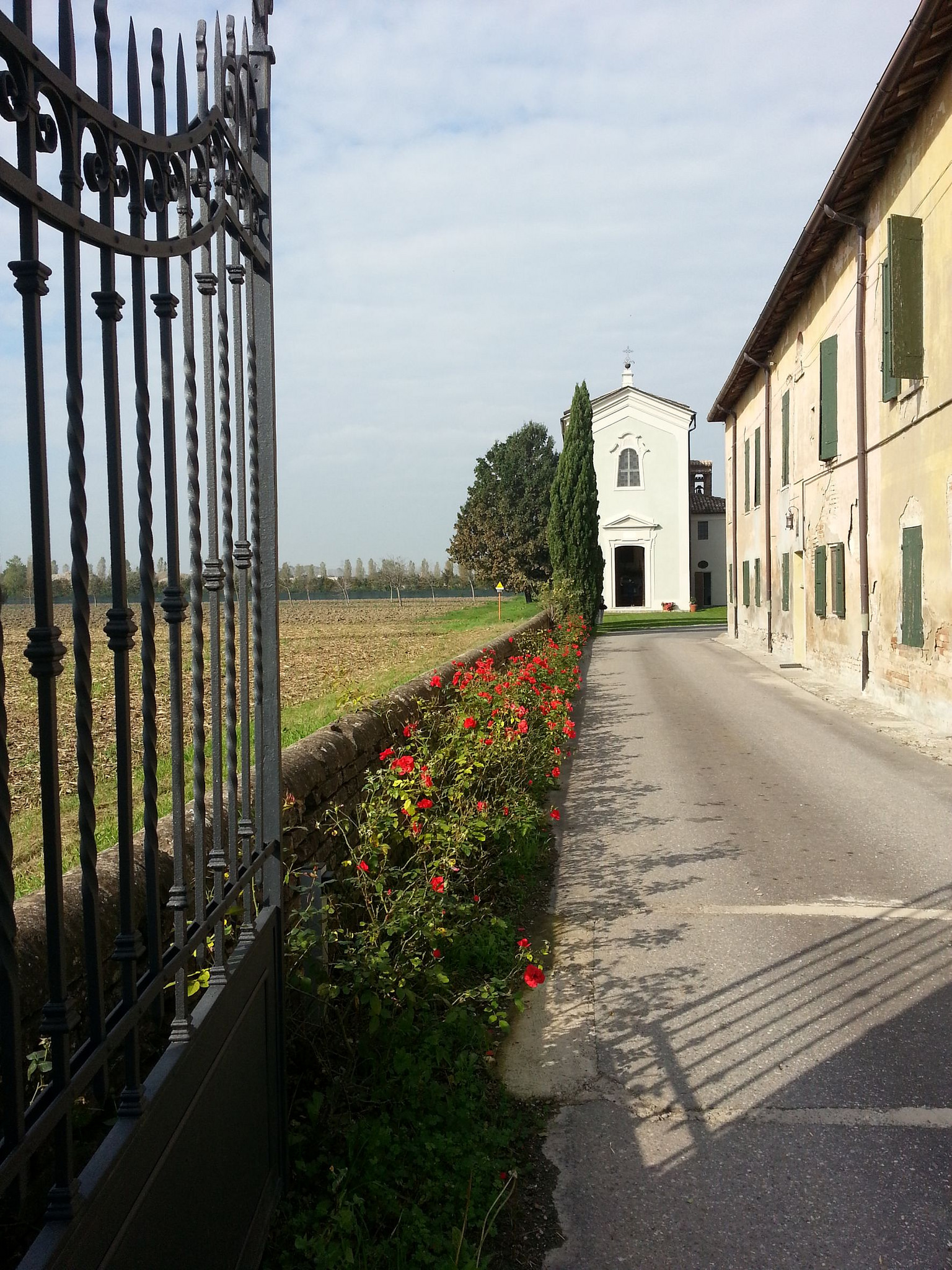 Valle di san Giulio, Cavazzoli. Ingresso alla corte e chiesa di san Giulio